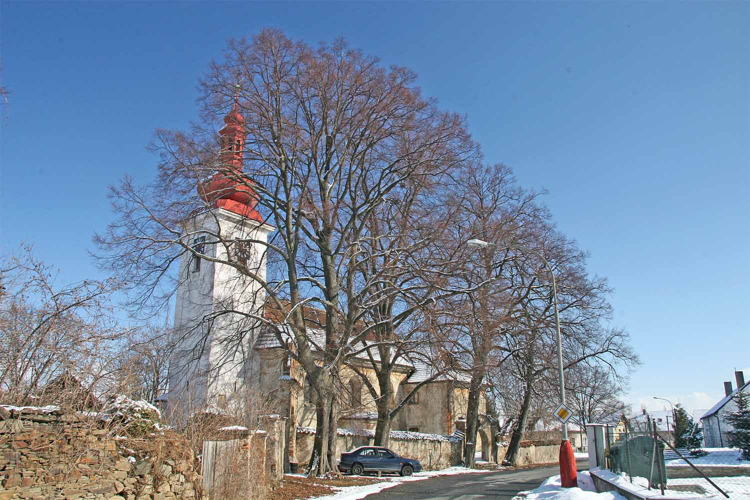 Skupina čtař památných lip v obci Solopysky v okrese Kutná Hora